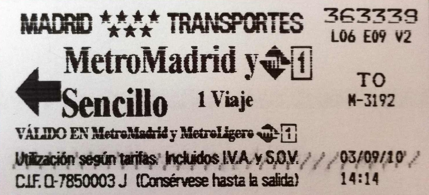 Ticket do metro de Madrid